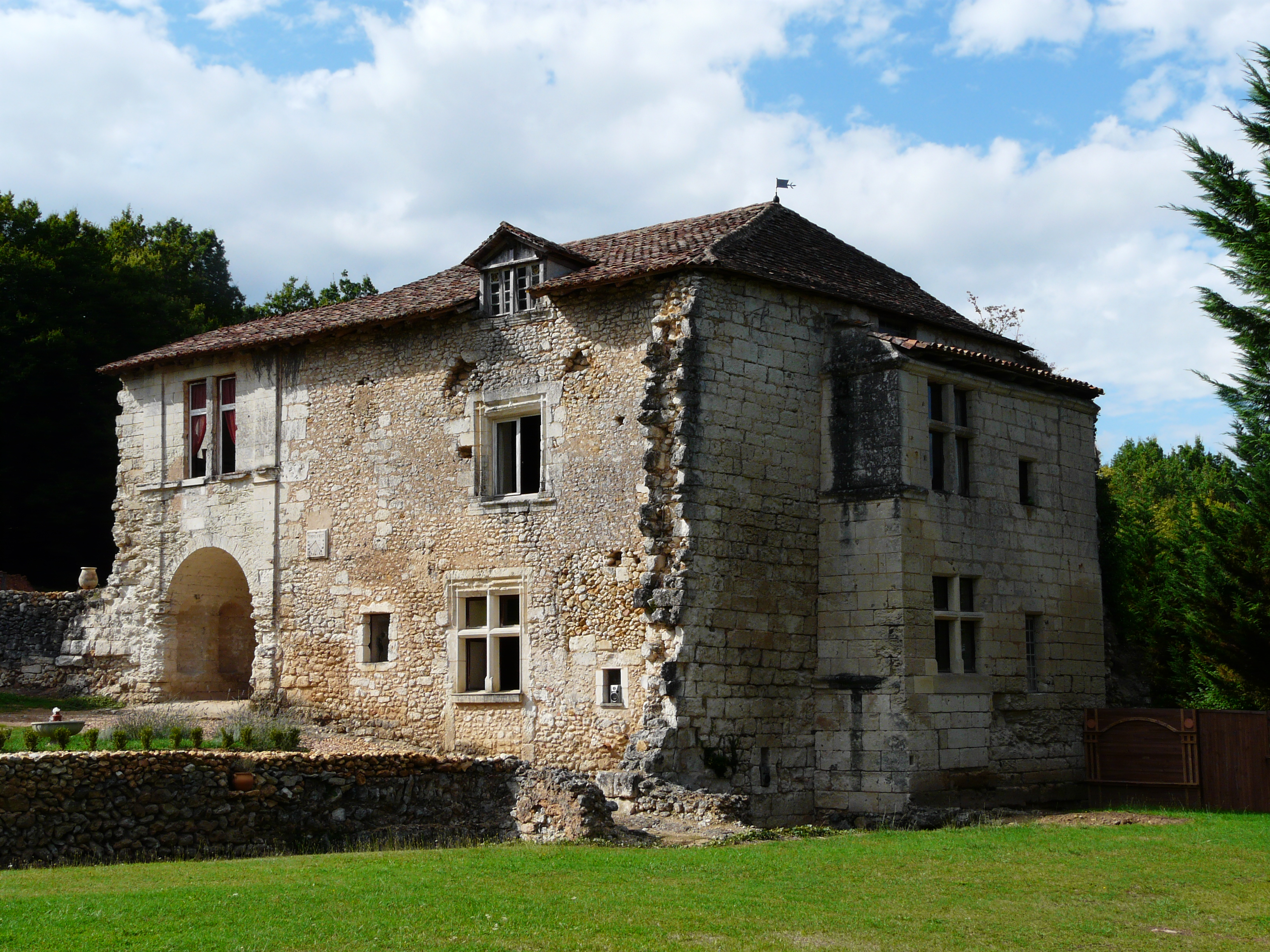 Les restes du château de Frateau à Neuvic, Dordogne